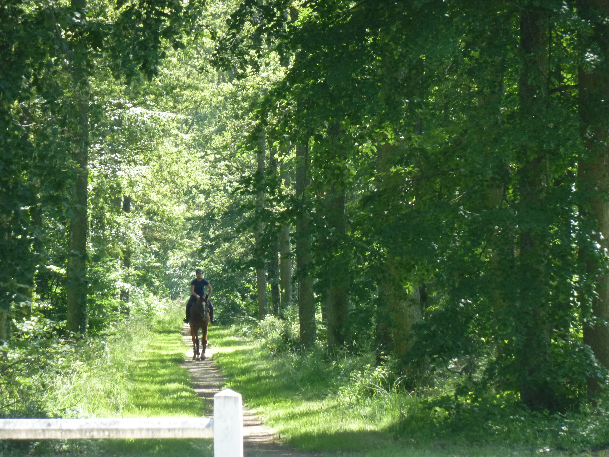 Allée du mail à Romans (Ain)